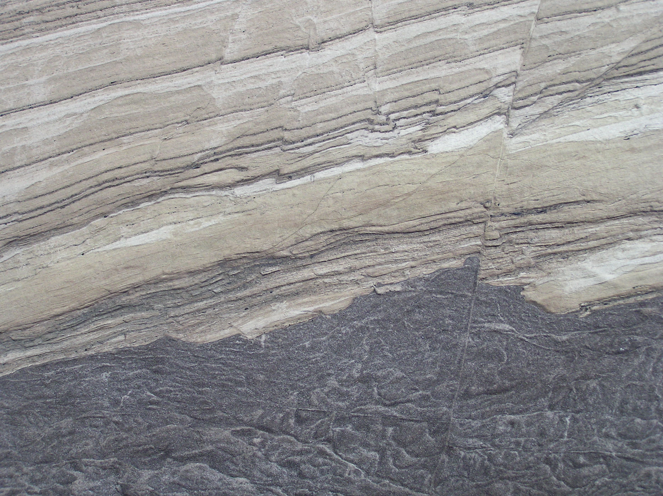 Pull-off of an epoxy resin lacquer, Lackabzug, Lignite open cast mine, Tagebau Garzweiler, Miocene, Frimmersdorfer Sande, Rhineland, Germany